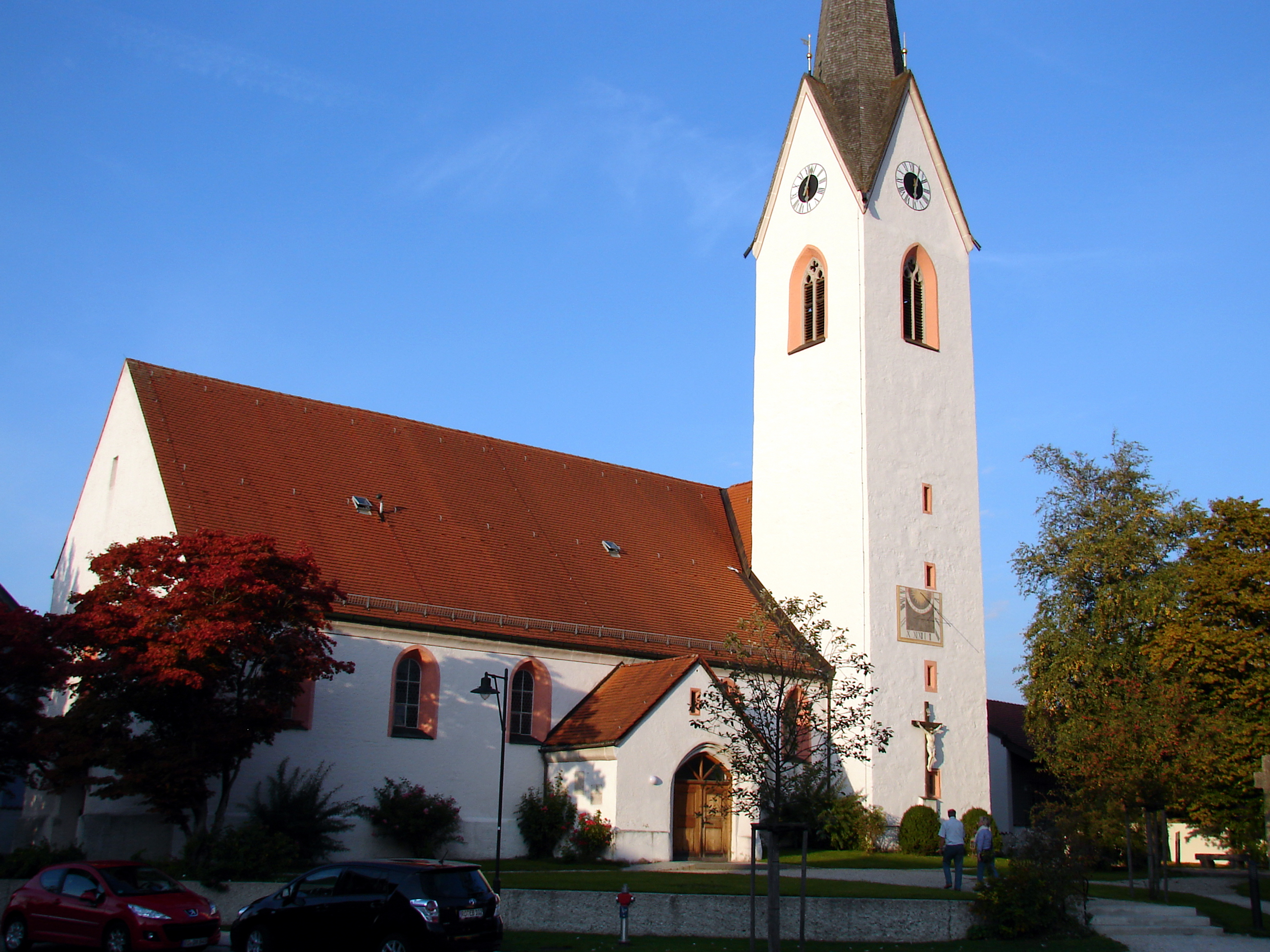 im Kern spätgotische Saalkirche mit eingezogenem Chor und Spitzhelmturm, Tuffsteinquaderbau 1367 vollendet, nach 1476 Anbau des südlichen Seitenschiffs, im 18. Jh. barockisiert, Turmhelm von 1866, 1958/59 Erweiterung nach Westen, restauriert 1985-87; mit Ausstattung.